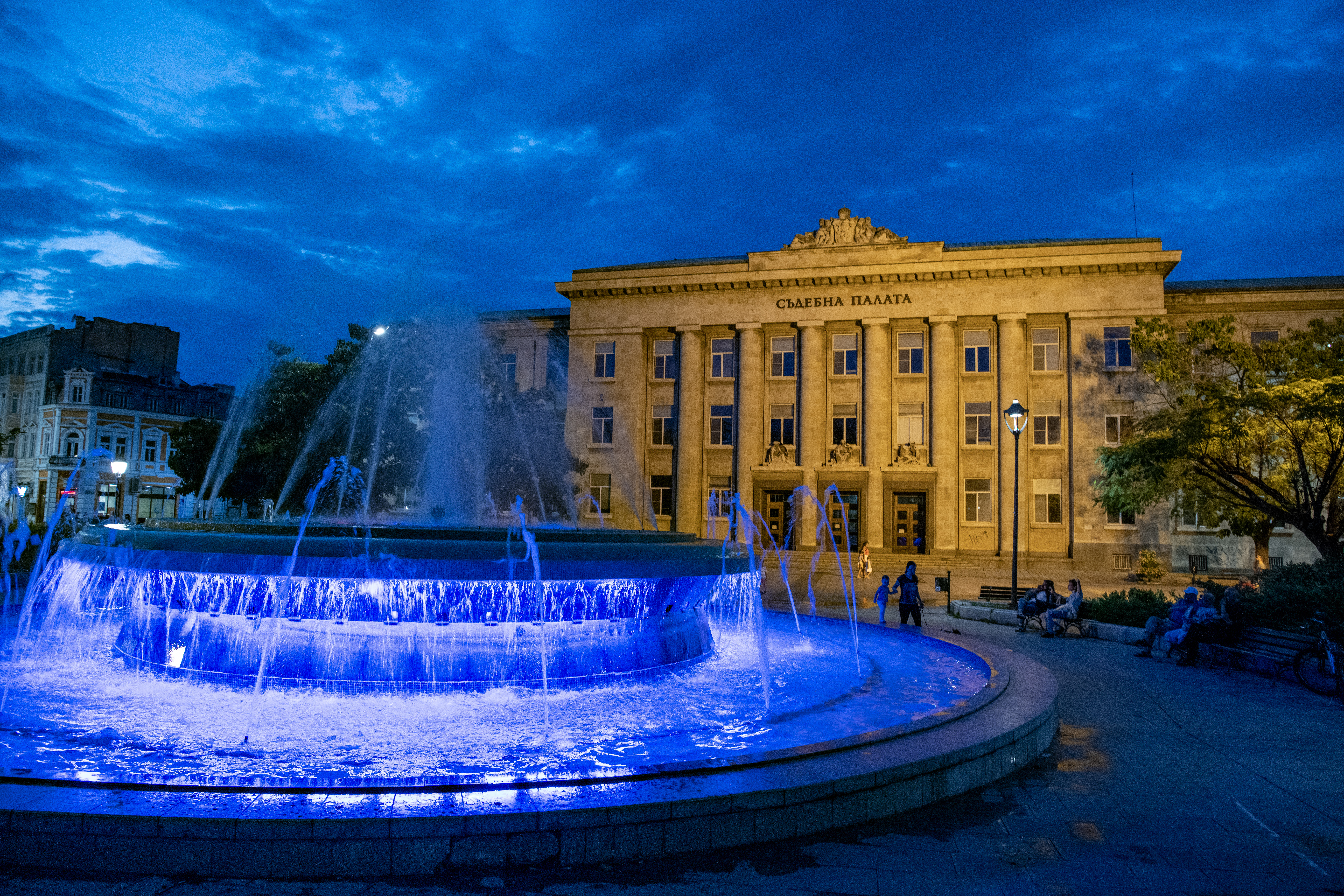 Снимката документира съдебната палата в град Русе.